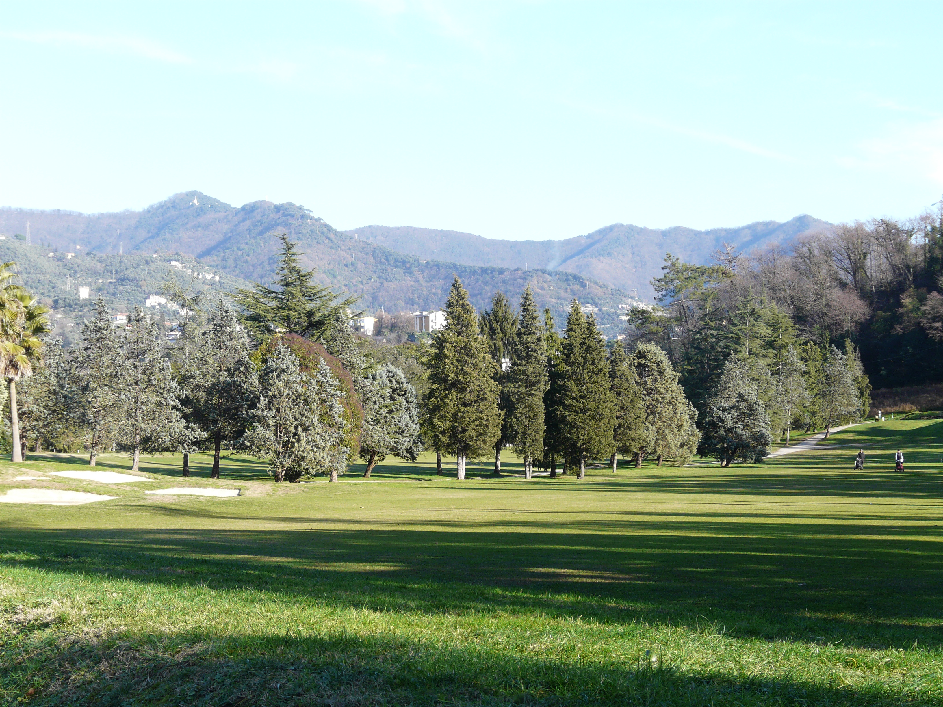 Campo da golf di Rapallo, Liguria, Italia